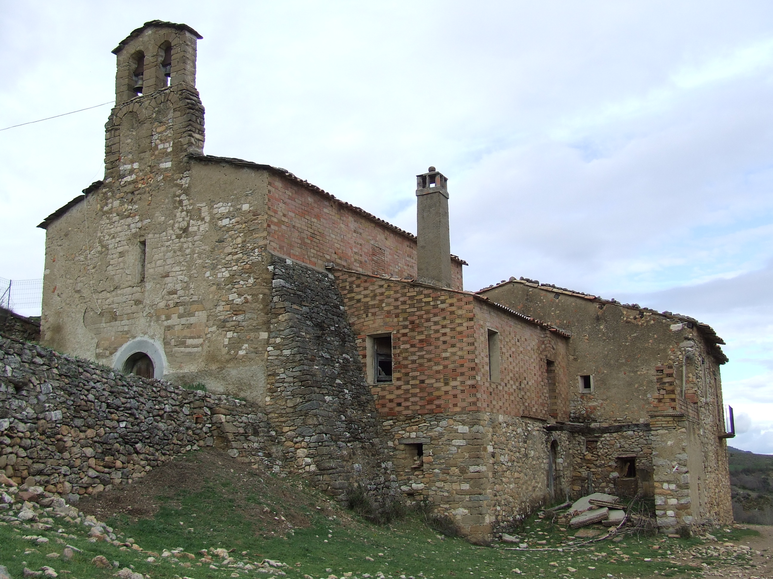 L'església i el que fou rectoria o monestir (Sant Esteve de la Sarga, Pallars Jussà)